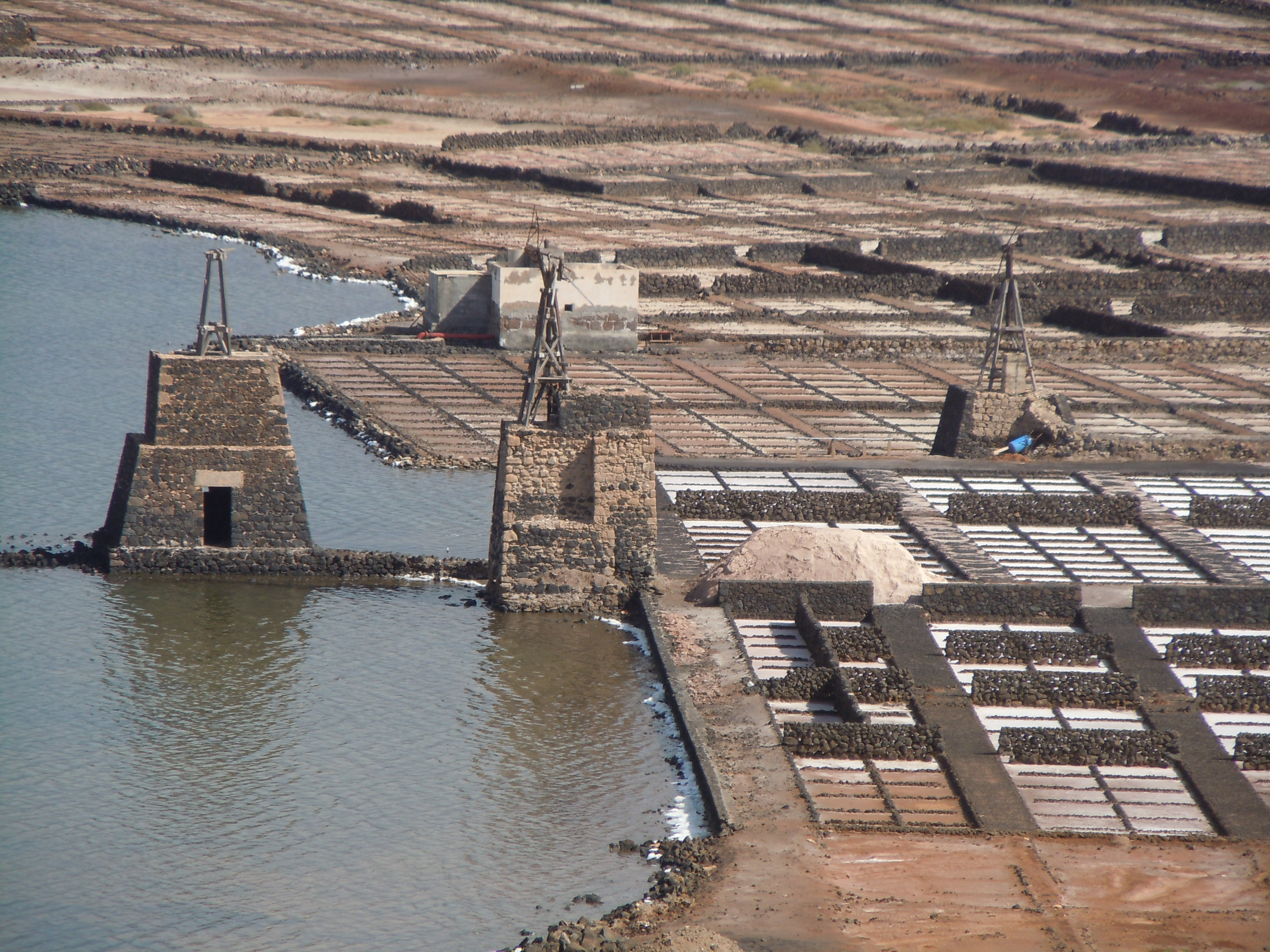 Salinas de Janubio, Lanzarote